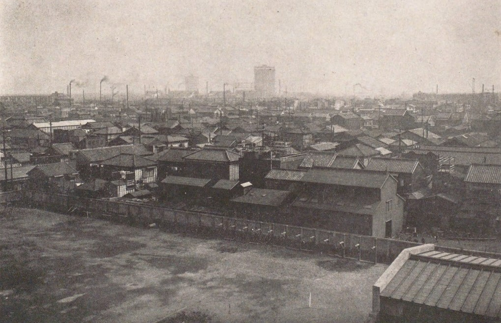 東京府立第三中学から亀戸方面。工場地帯